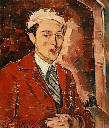 Tasso Marchini (1907-1936) - Portretul pictorului Antal Andor Fülöp (1908-1979), ulei pe pânză, 71 x 61 cm, semnat şi datat st. jos: (1)933 T. Marchini, dedicaţie st. jos: Fülöp Andor barátomnak (prietenului Fülöp Andor) .